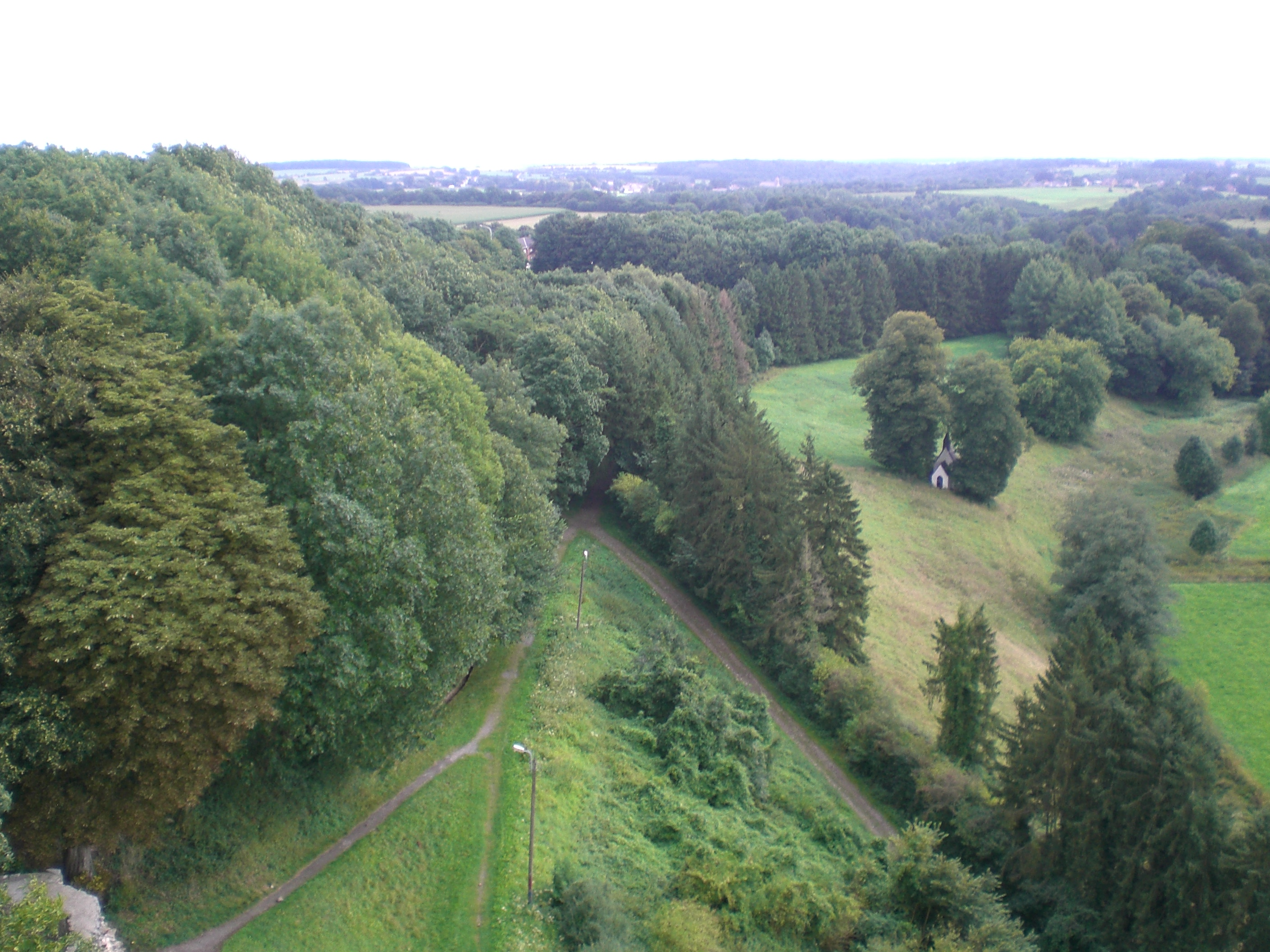 chapelle aux pied de la tour de la salamandre à Beaumont (Hainaut) belgique